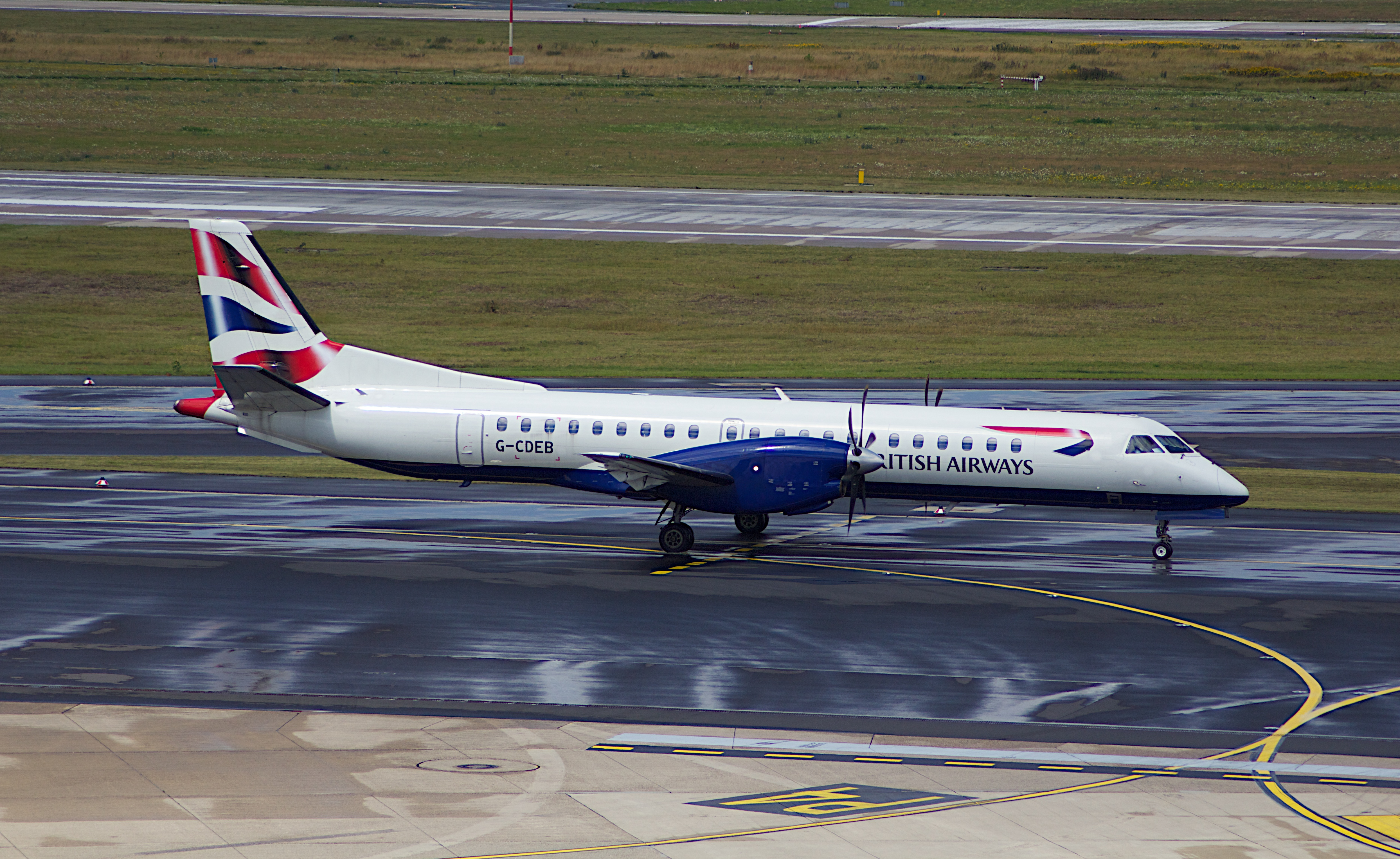 Dusseldorf Airport.